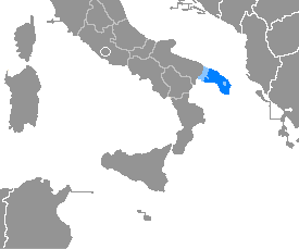 Idioma salentino